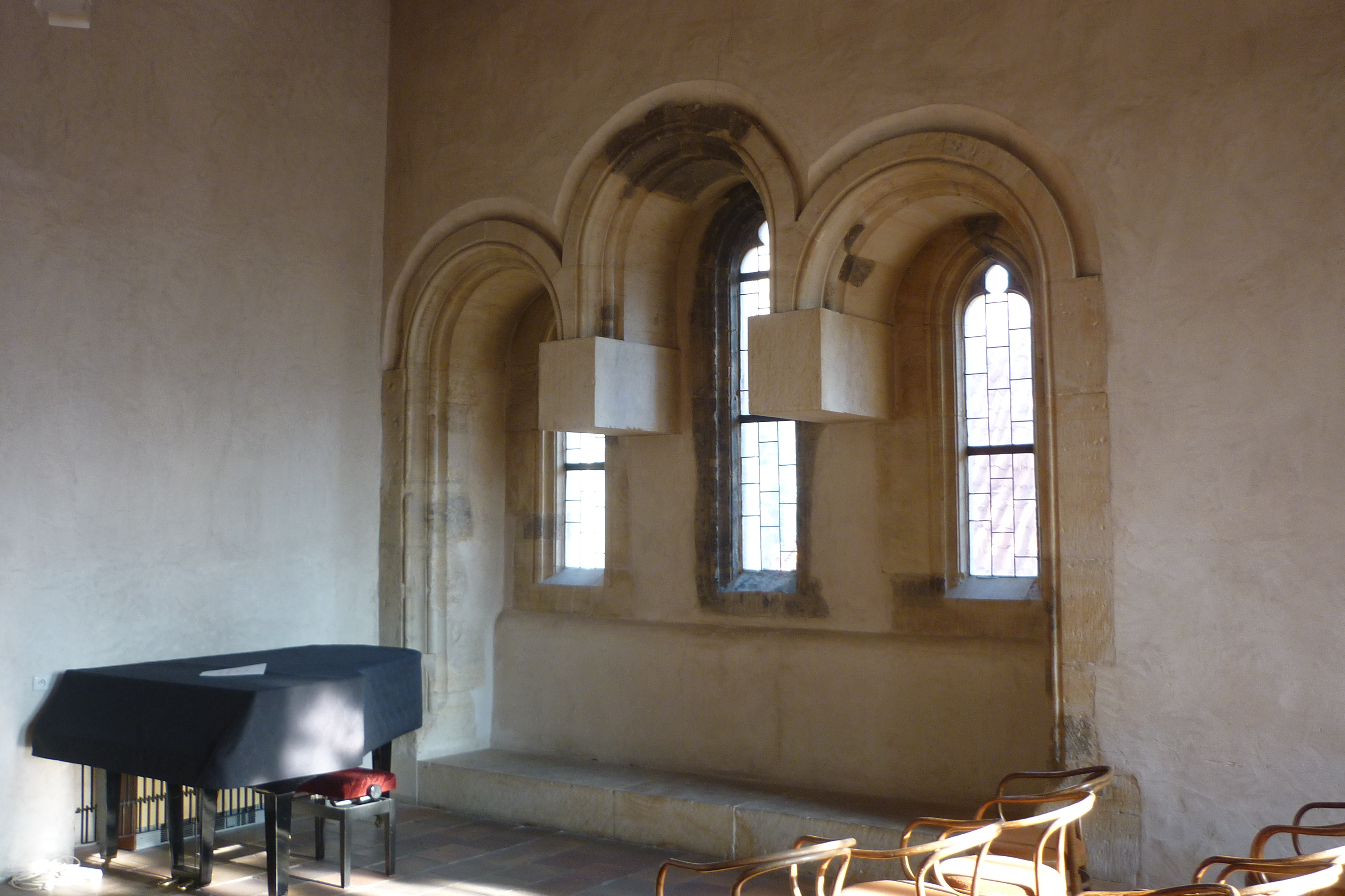 Trojlaločná nika v jižní stěně sálu ve druhém patře domu U Kamenného zvonu